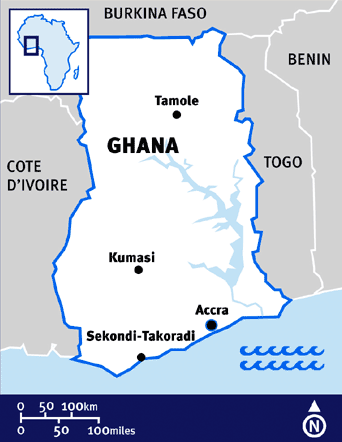 Carte des stades retenus pour la CAN 2008 (football)